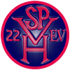 Logo der SpVgg Hadamar